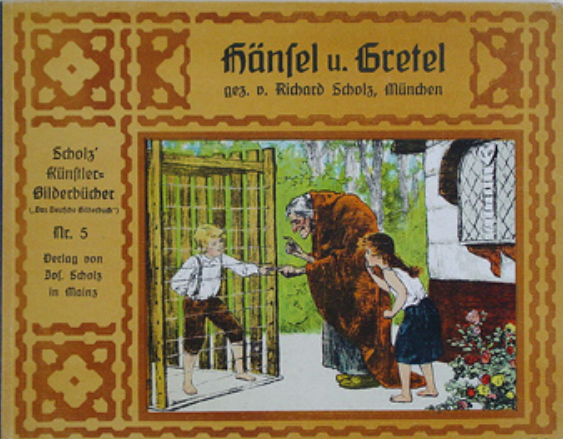 Hänsel und Gretel, illustriert von Richard Scholz, Scholz Künstler-Bilderbücher Nr. 5